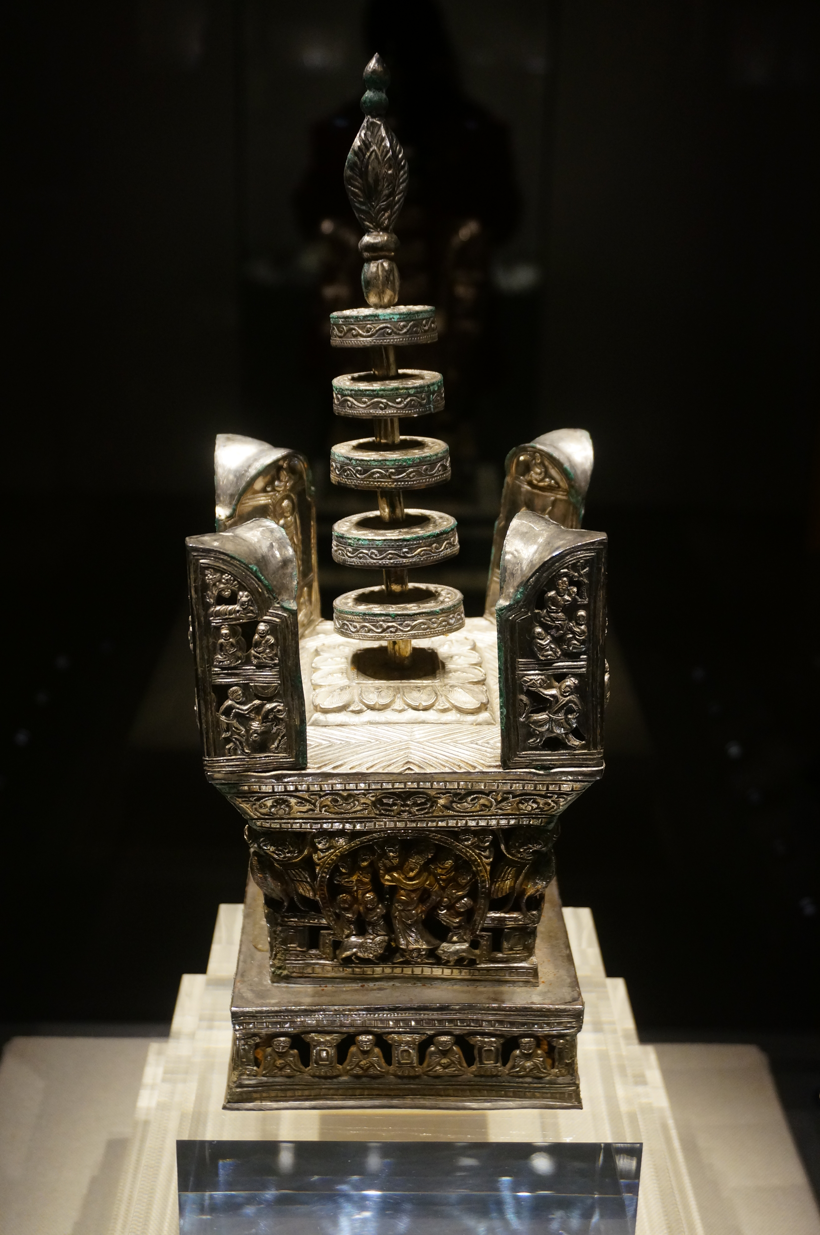 鎏金纯银阿育王塔，雷峰塔遗址出土，现藏浙江省博物馆孤山馆舍。